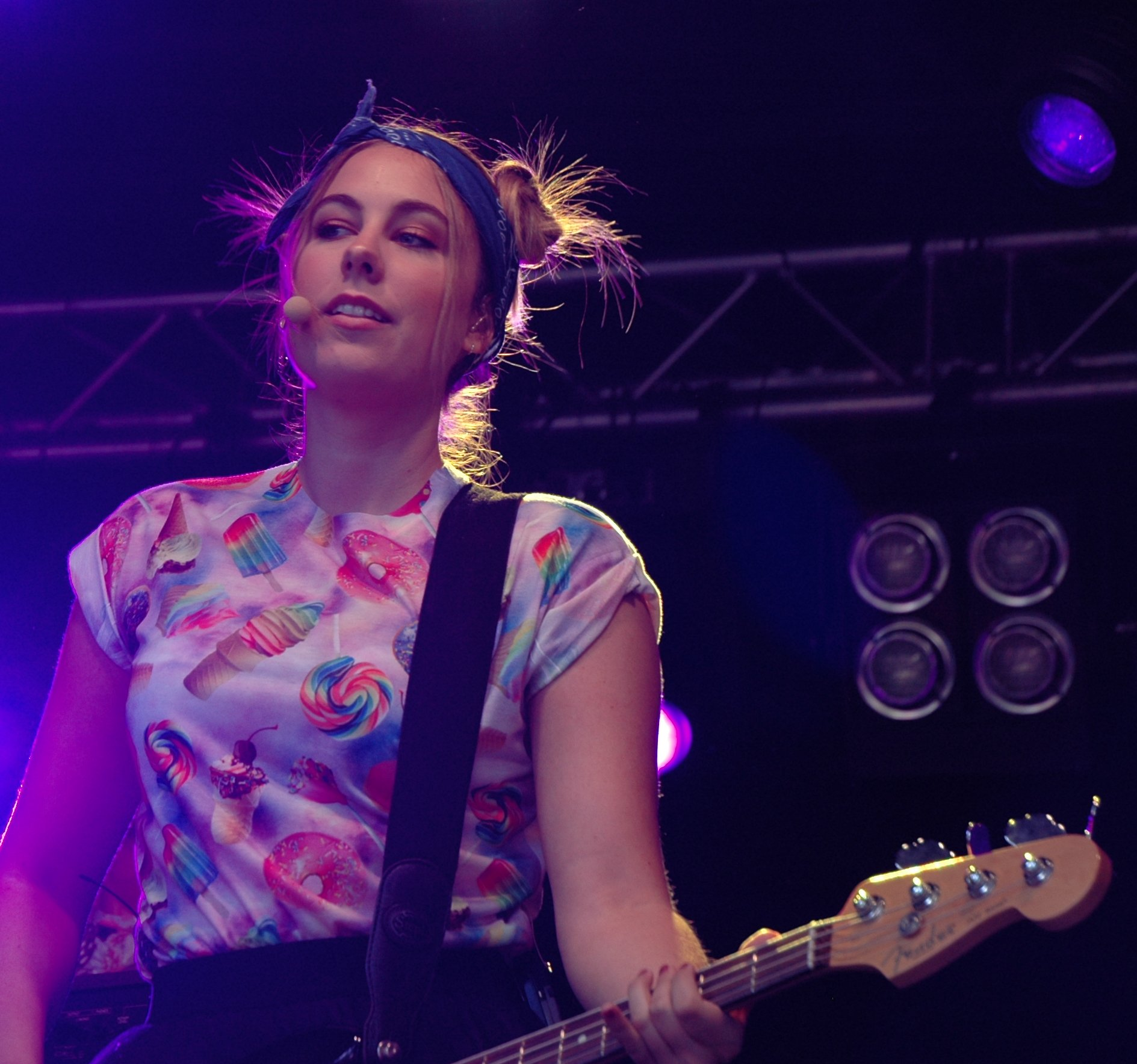 Marie Verhulst tijdens een optreden van de Ghost Rockers in Kortrijk